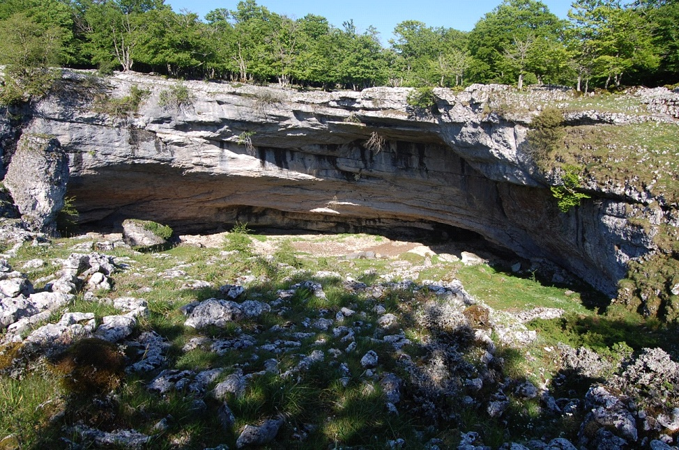 Frontal de la Cueva de Lezaundi, Navarra.